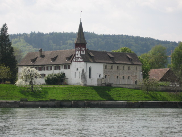 Wagenhausen